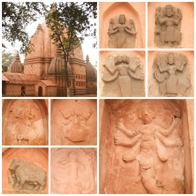 অসমীয়া: গোলাঘাট জিলাৰ নেঘেৰিটিঙত থকা শিৱ দৌল আৰু দৌলৰ গাত থকা কেইটামান ভাস্কৰ্যৰ ছবি।